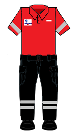 Uniforme de manga corta del 112-Sacyl